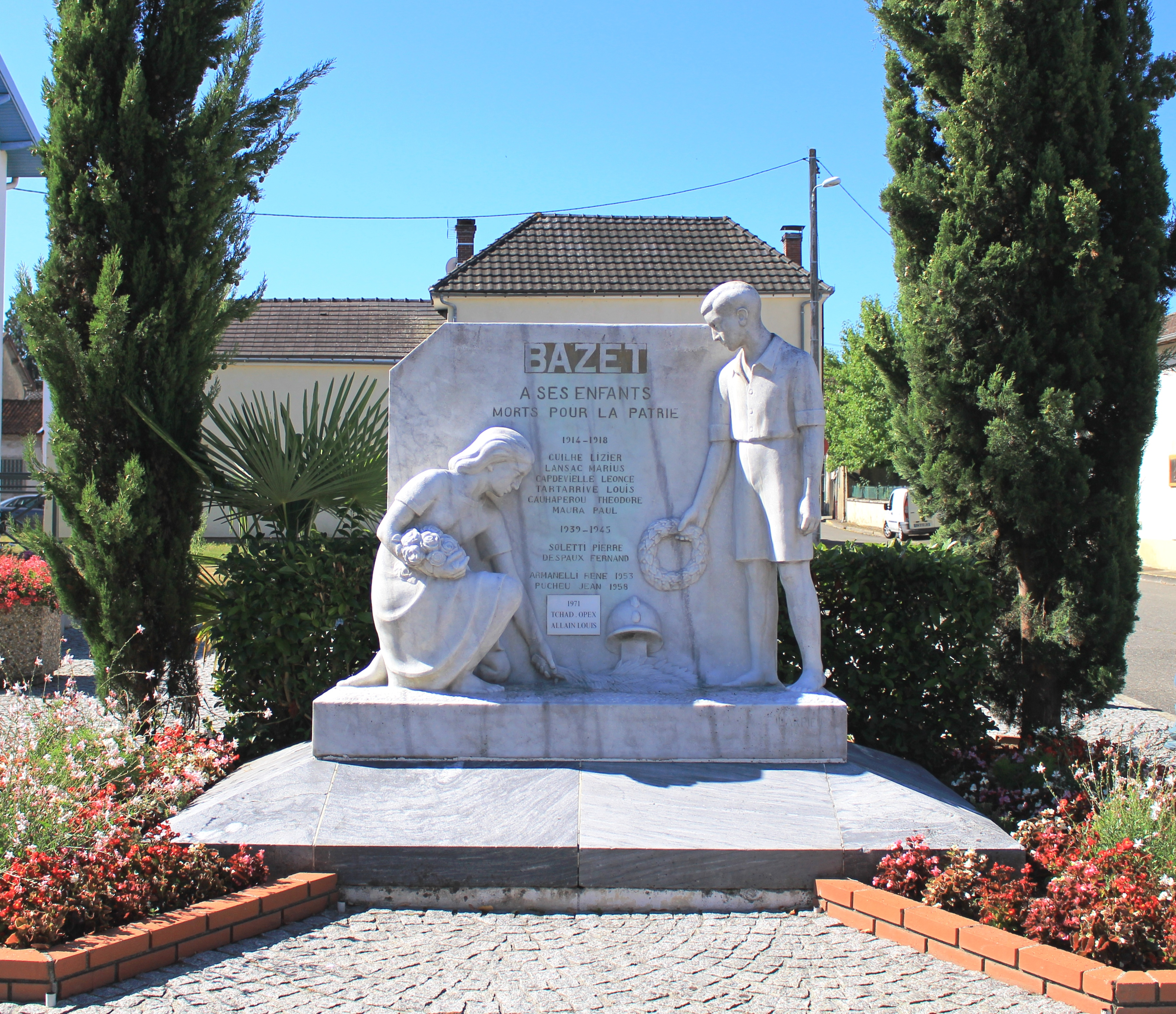 Monument aux morts de Bazet (Hautes-Pyrénées)